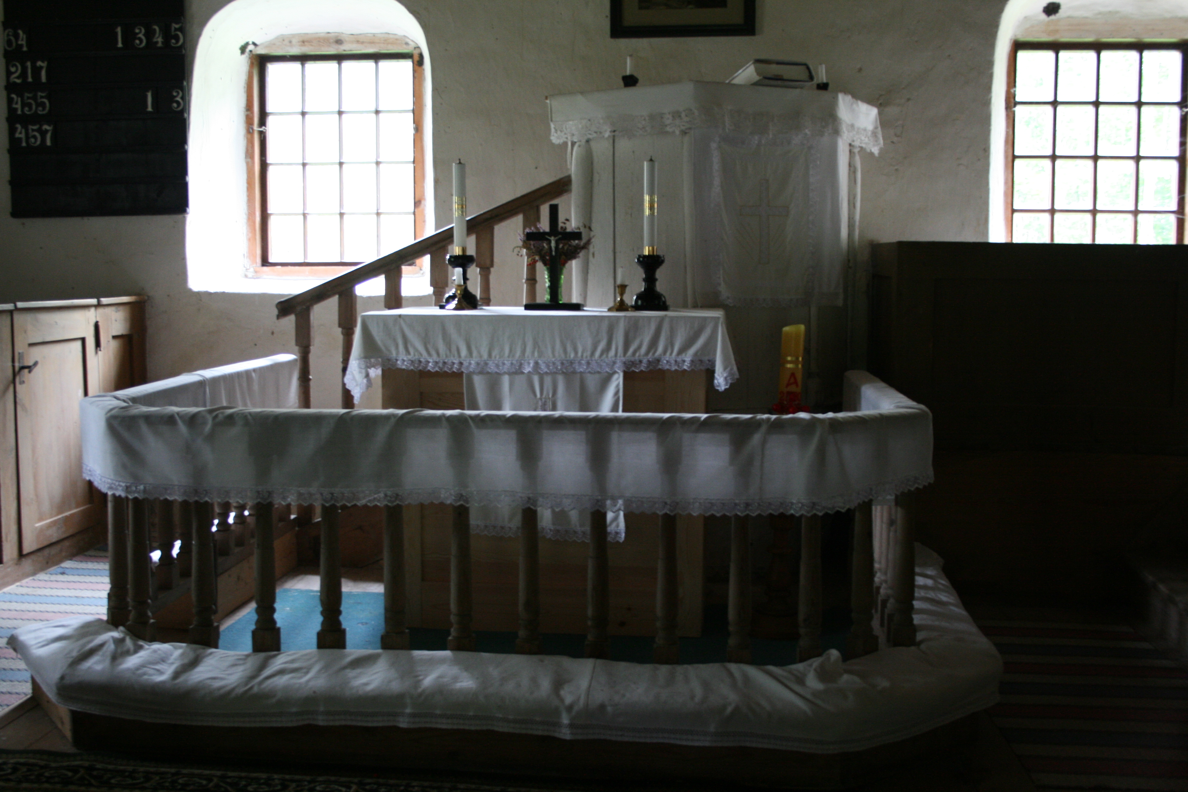 Hiiumaal EELK Kassari kabel. Altar-kantsel koos altaraiaga, 18 saj. (puit, õli)